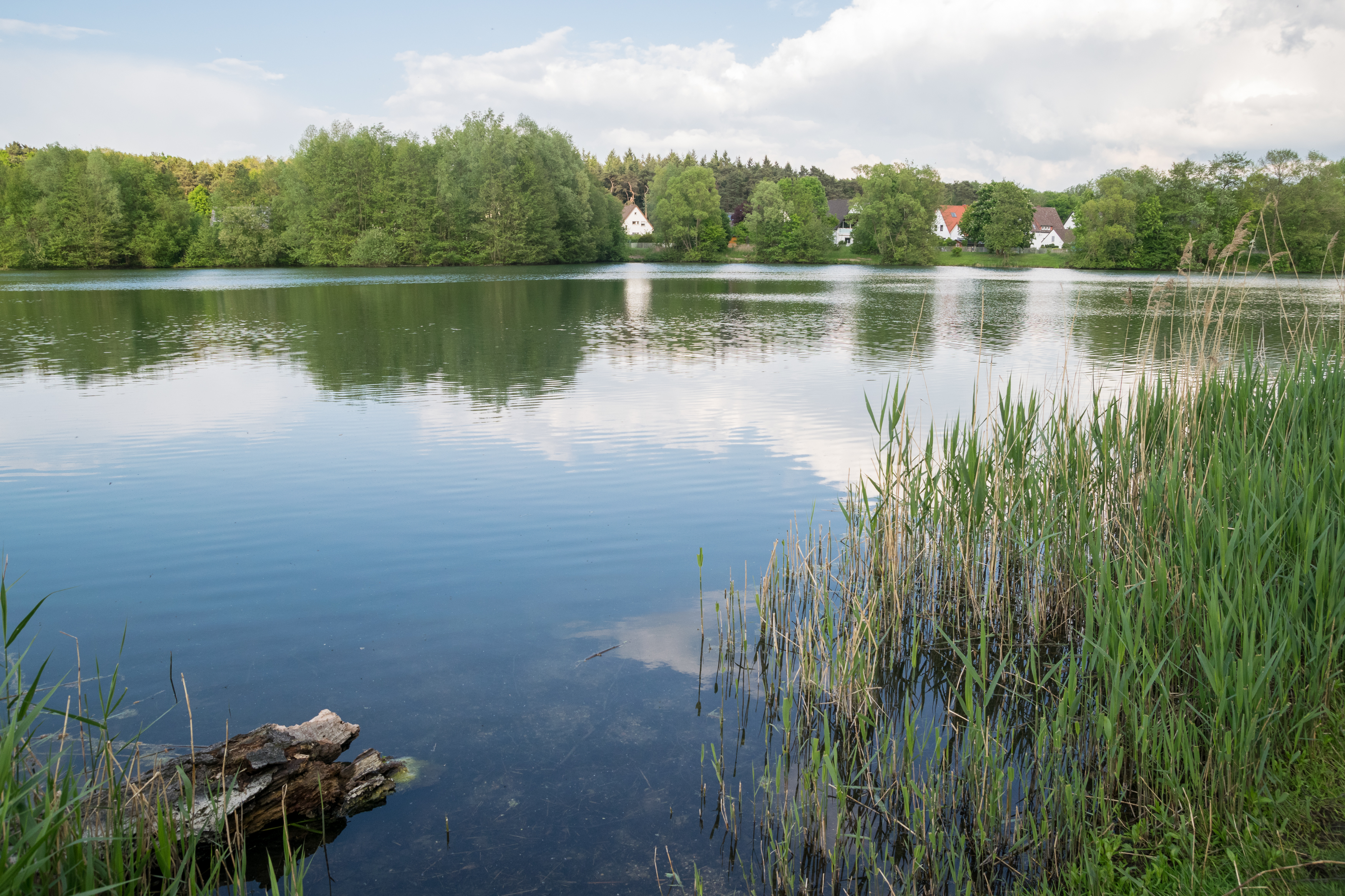 Werresiek bzw. Waddenhauser See im LSG Westliches Lipper Bergland, Ravensberger Hügelland und Bielefelder Osning, Lage-Waddenhausen, Kreis Lippe